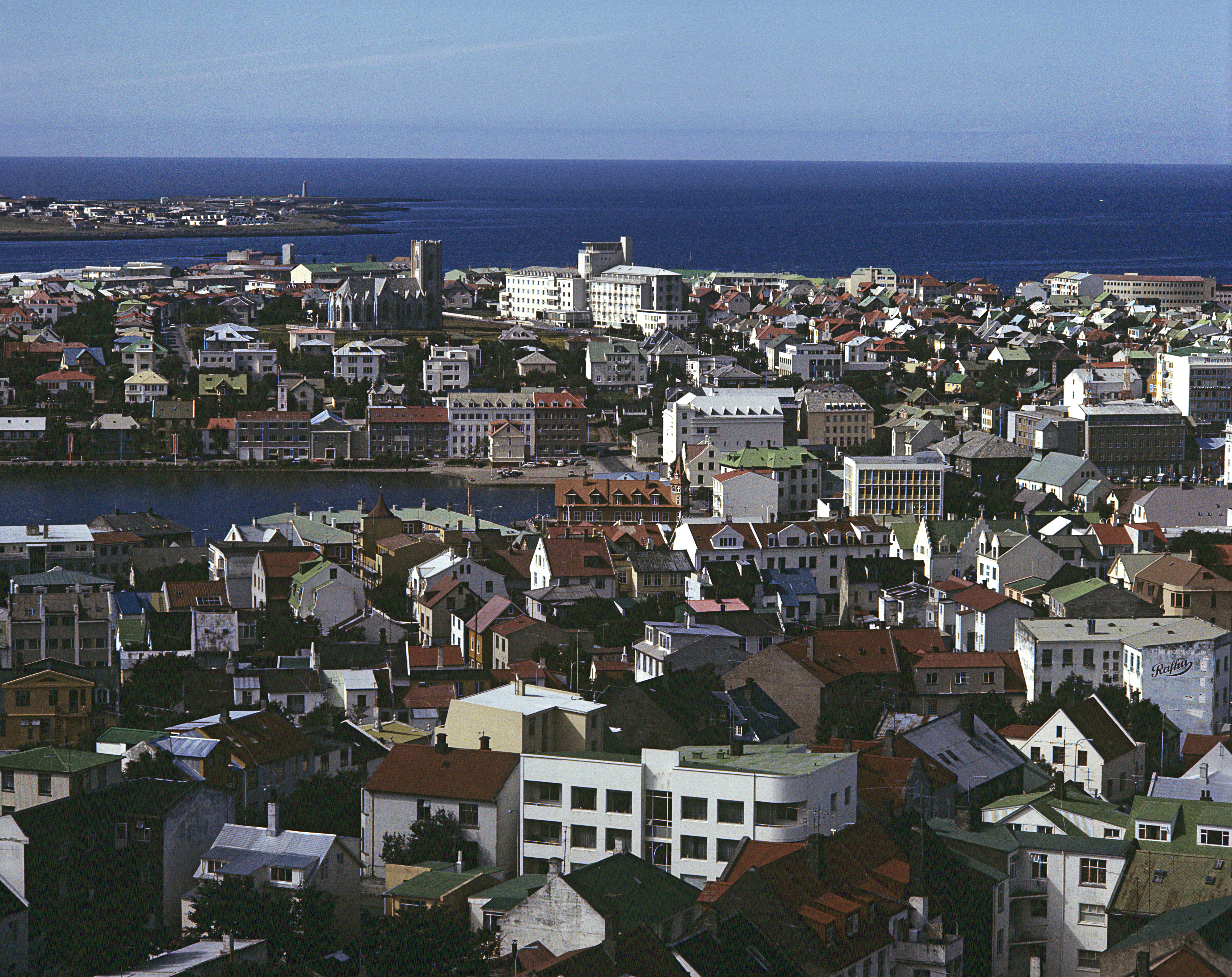 Reykjavík von der Hallgrímskirkja aus. Im Hintergrund die katholische Kathedrale und gegenüber das katholische Krankenhaus. Das Rathaus am Tjörnin ist noch nicht gebaut.